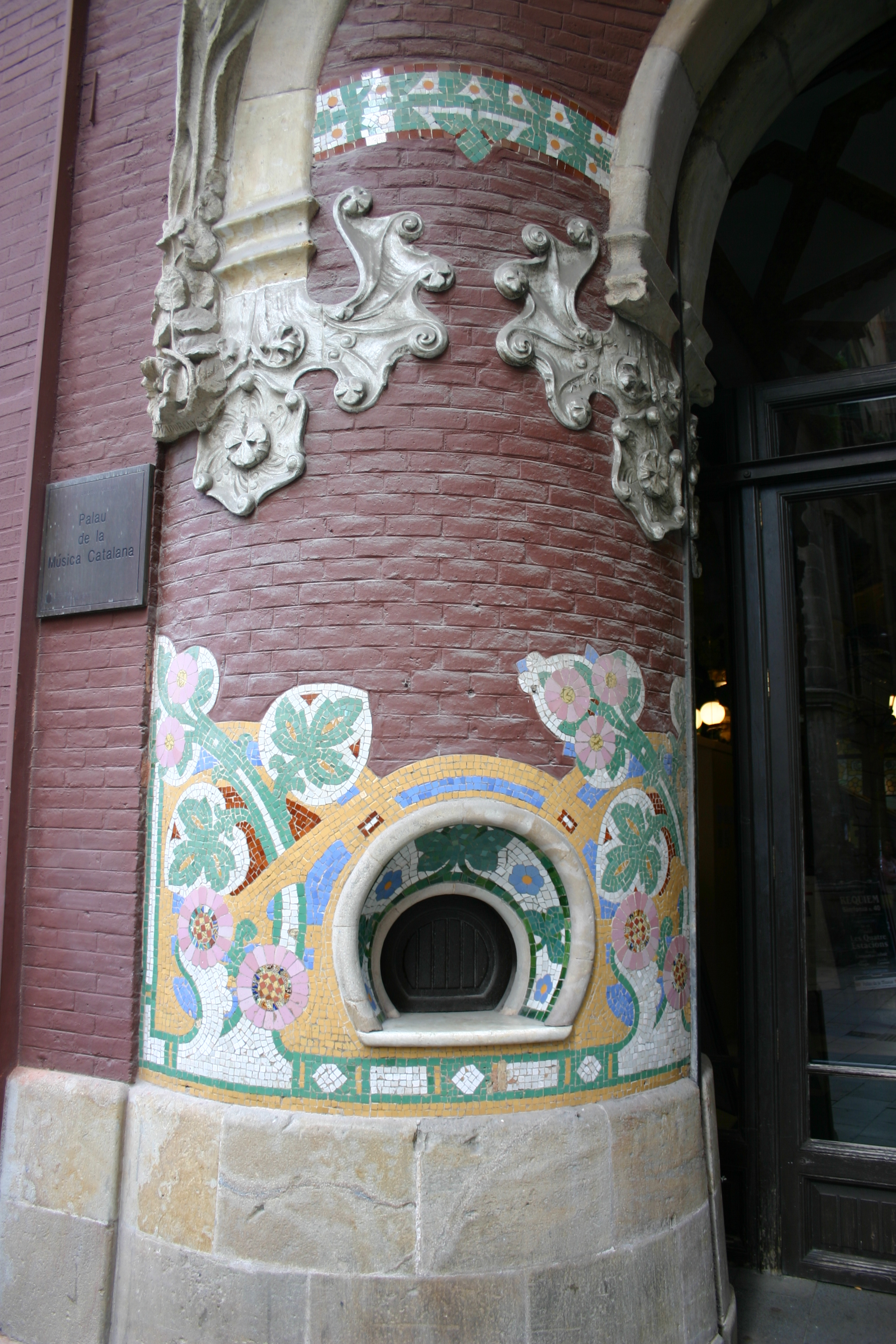 Palau de la Música Catalana. Arquitecte:Lluís Domènech i Montaner